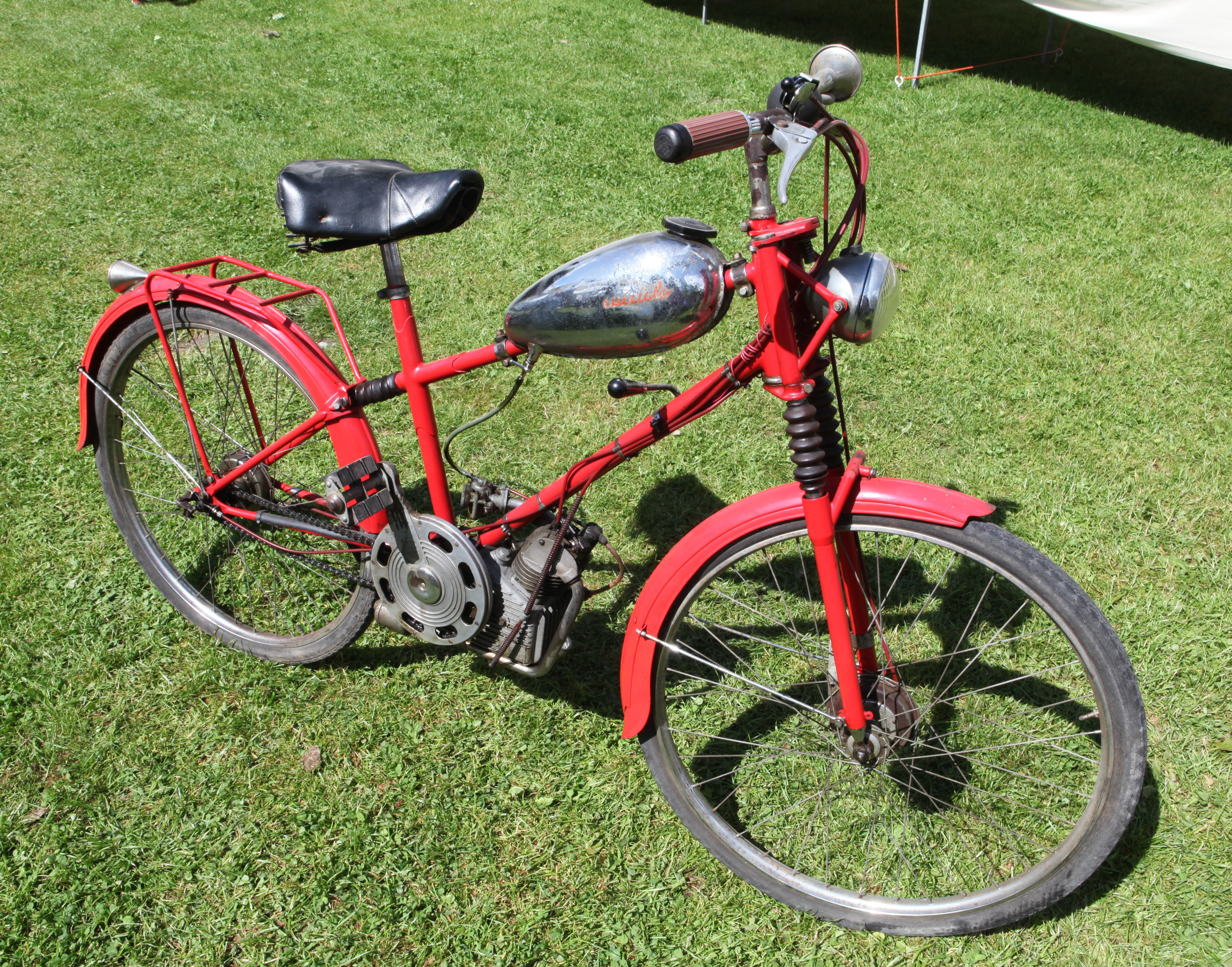 1950/51 cucciolo ducati in original un restored condition with a 48 cc Ducati engine